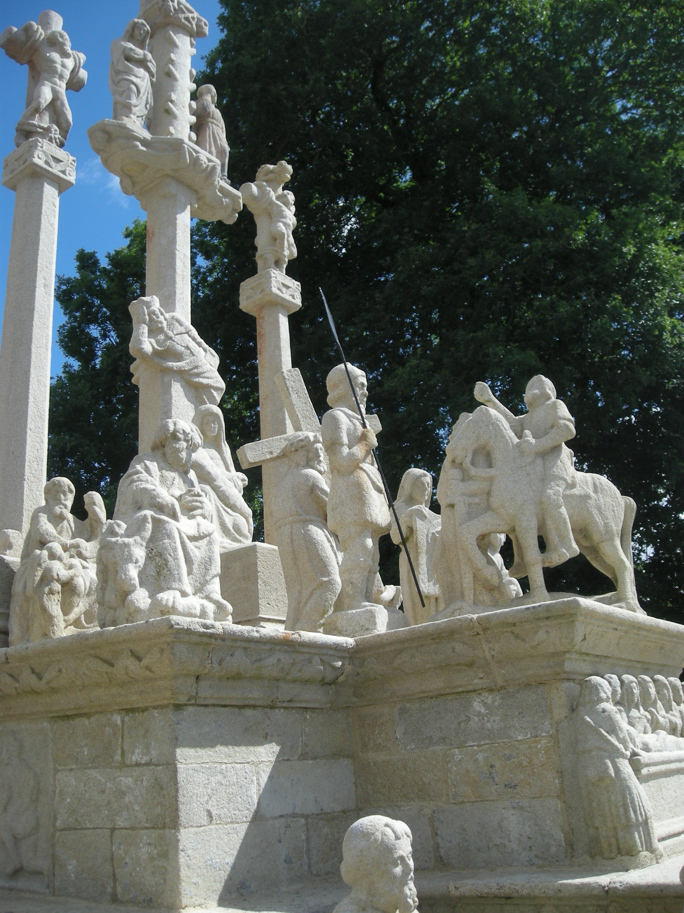 Calvaire du 16e siècle .